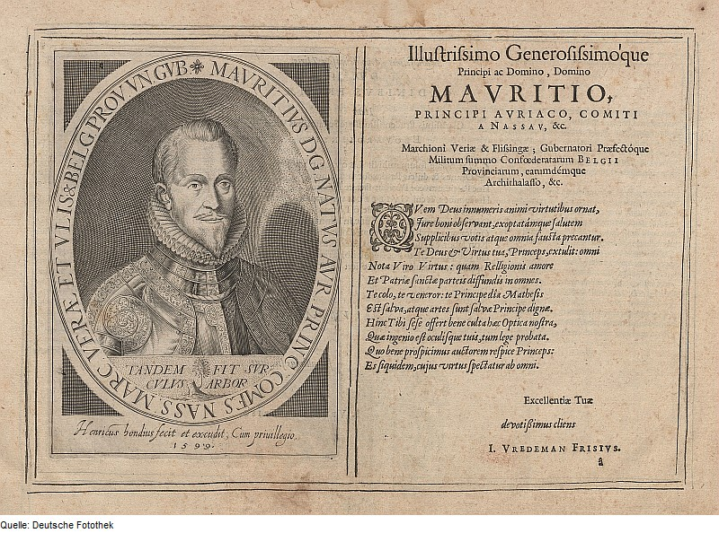 Original image description from the Deutsche FotothekPorträt & Verleger & Drucker